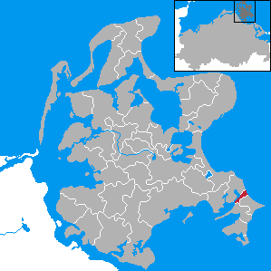 Baabe, Landkreis Rügen, Mecklenburg-Vorpommern